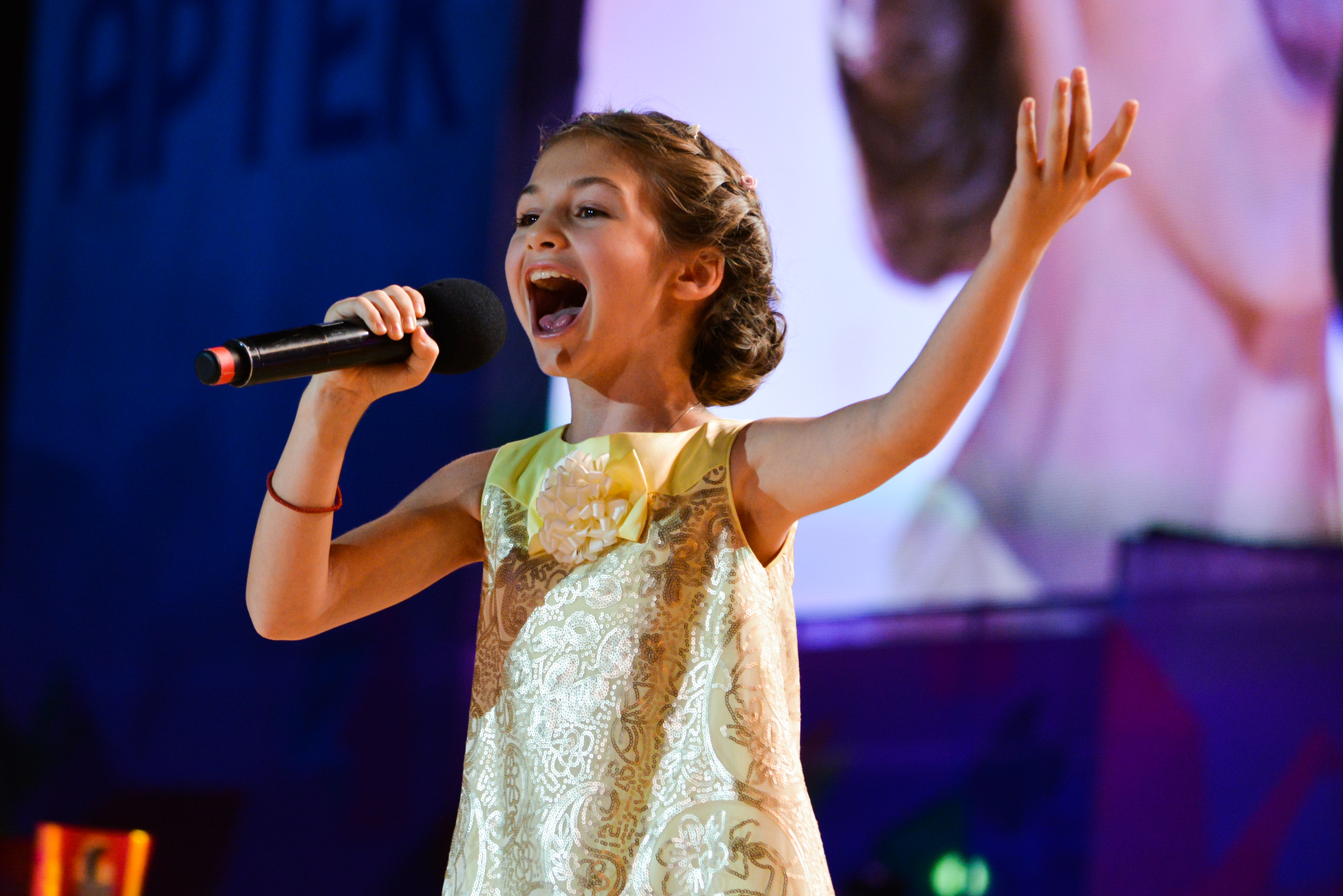 Крисия Тодорова на Детской Новой волне 2015